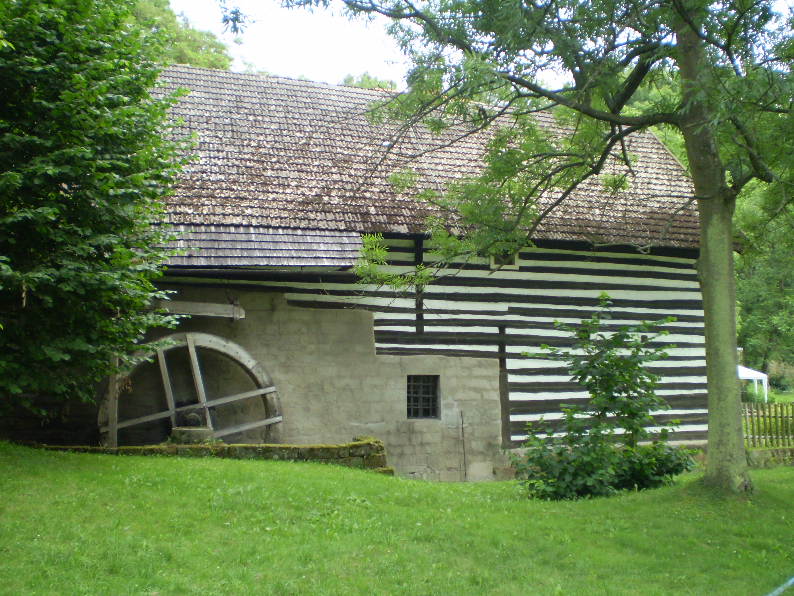 Vodní mlýn čp. 1, Střehom 1, Střehom.